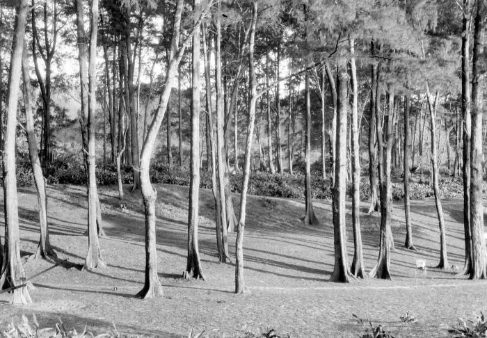 Negatief. Tjemara's langs de kust bij Lhonga, Atjeh